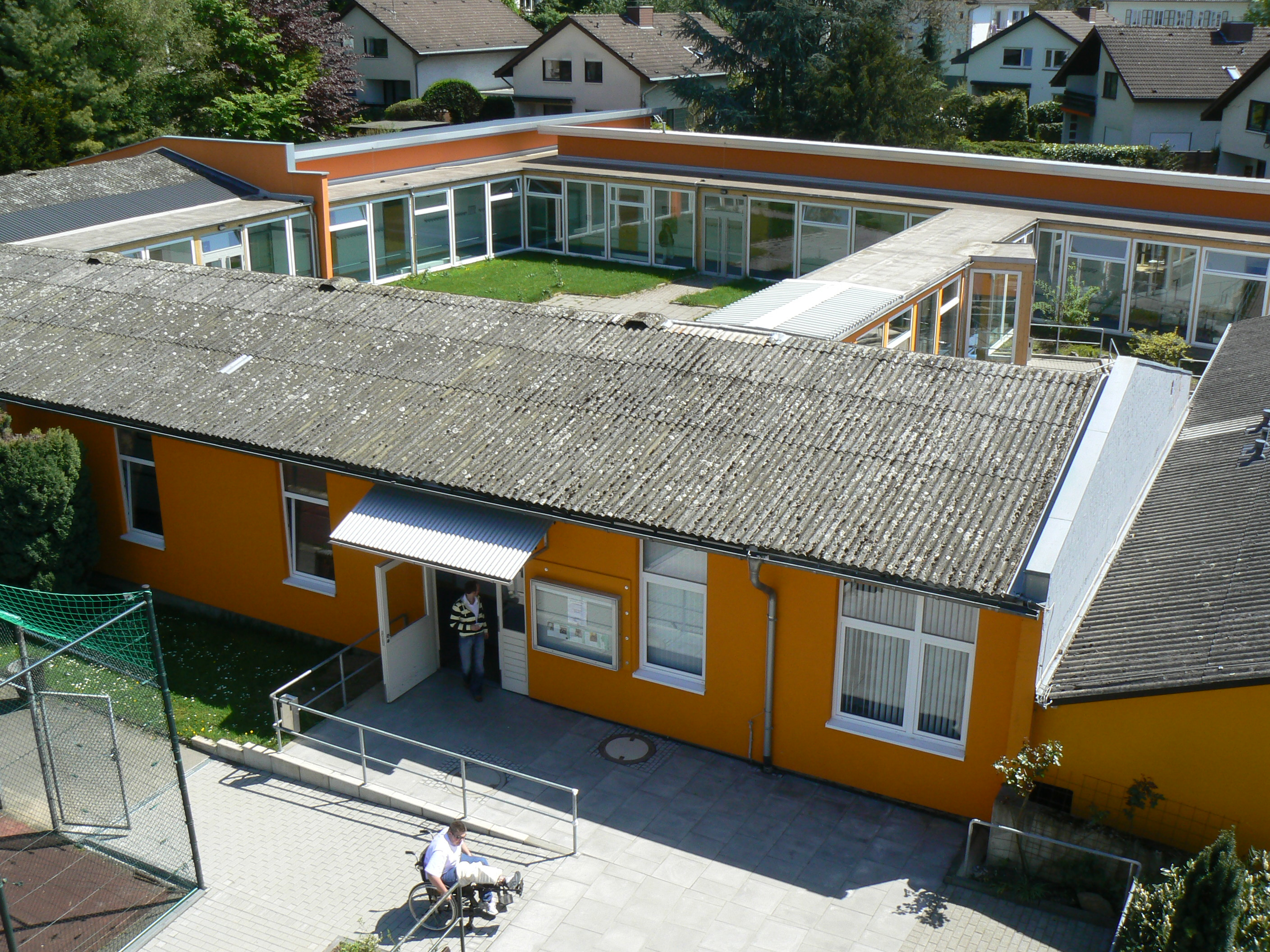 Ansicht des Nell-Breuning-Berufskolleg, Rhöndorf